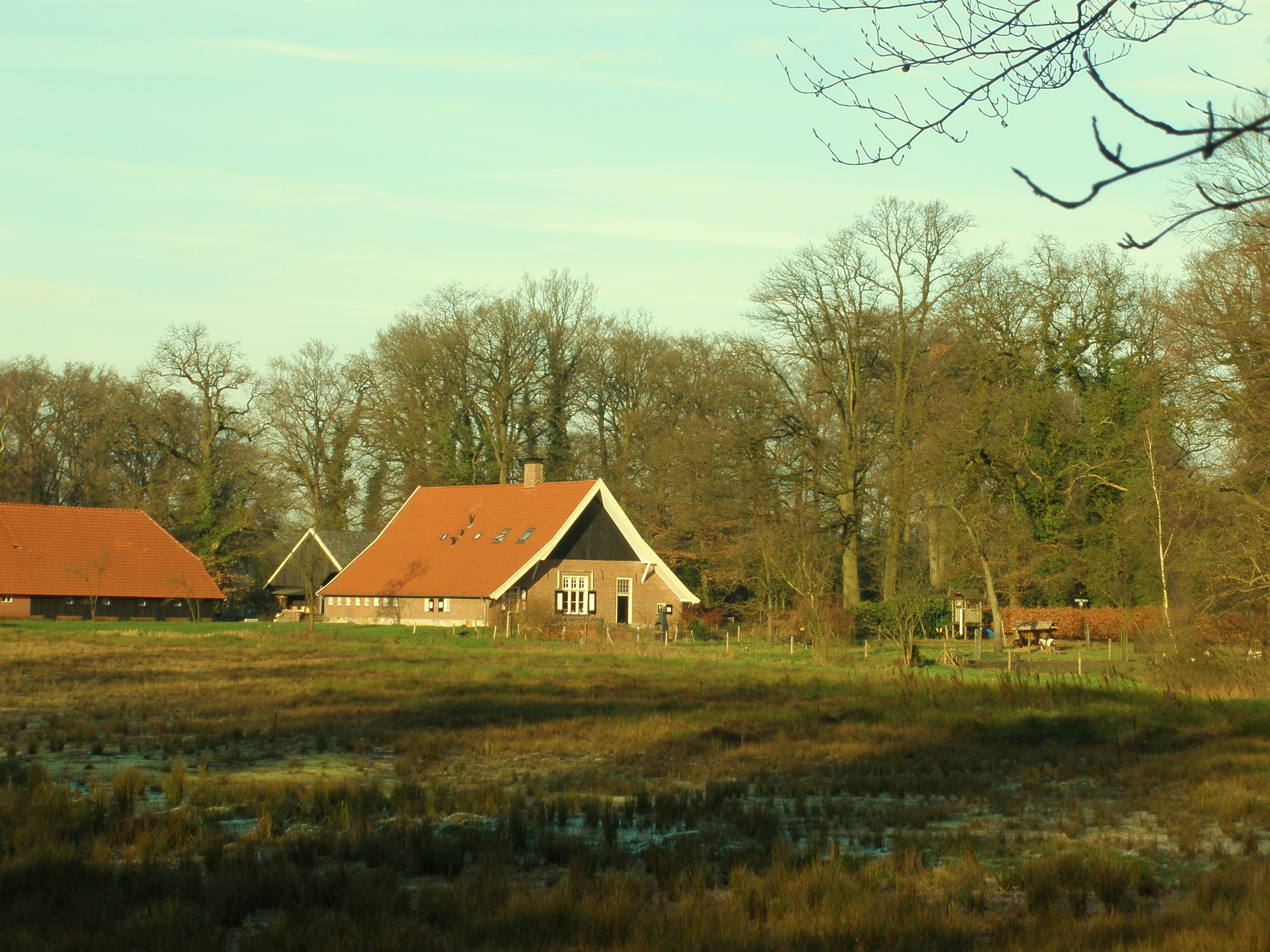 boerderij Dubbelink Havezate in Azelo